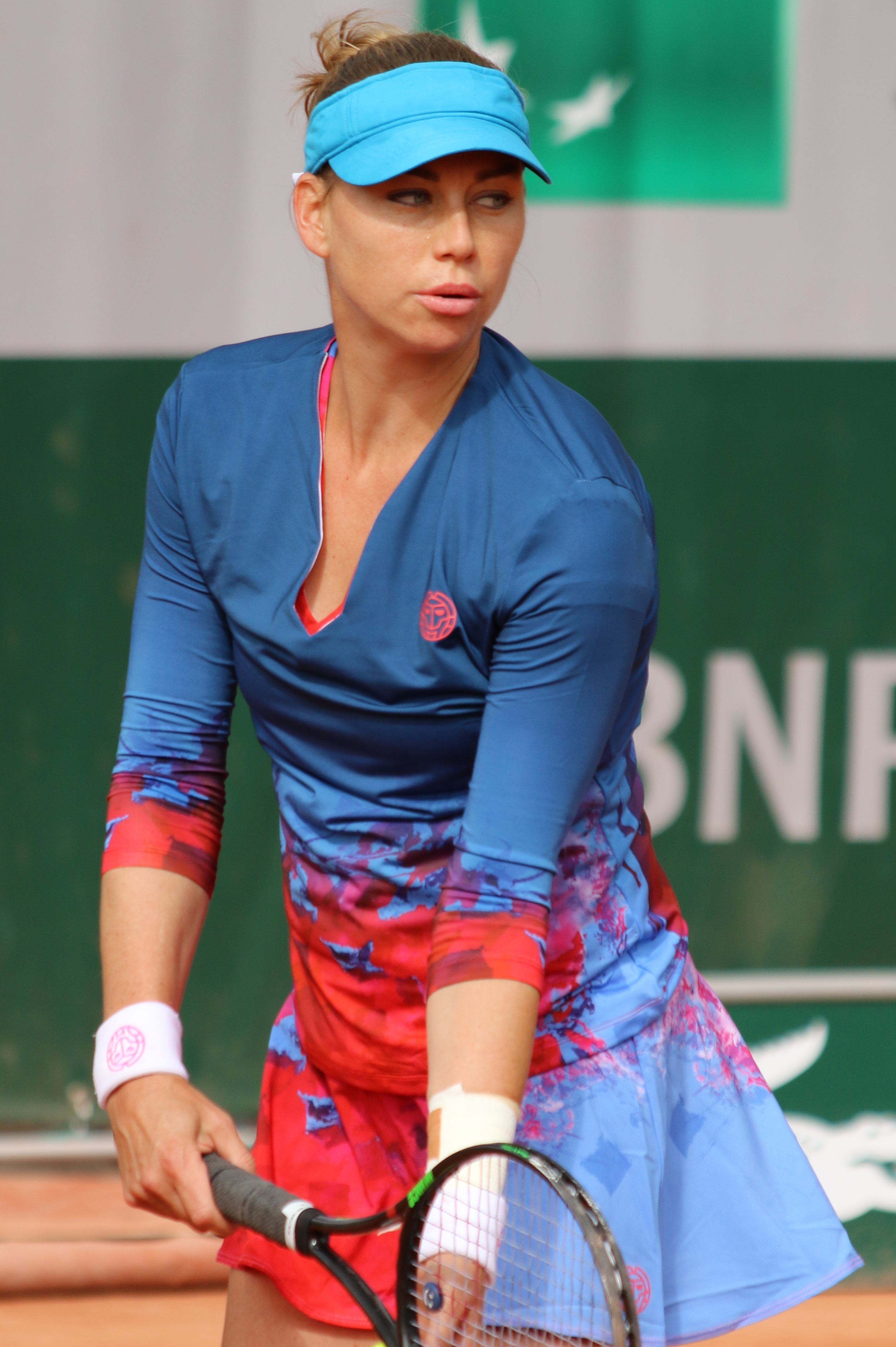 Zvonareva RG19 (32)